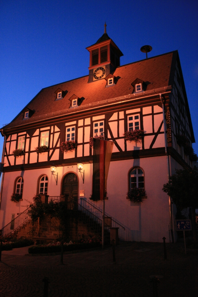 Das Alte Rathaus, Marktplatz 5, 61118 Bad Vilbel